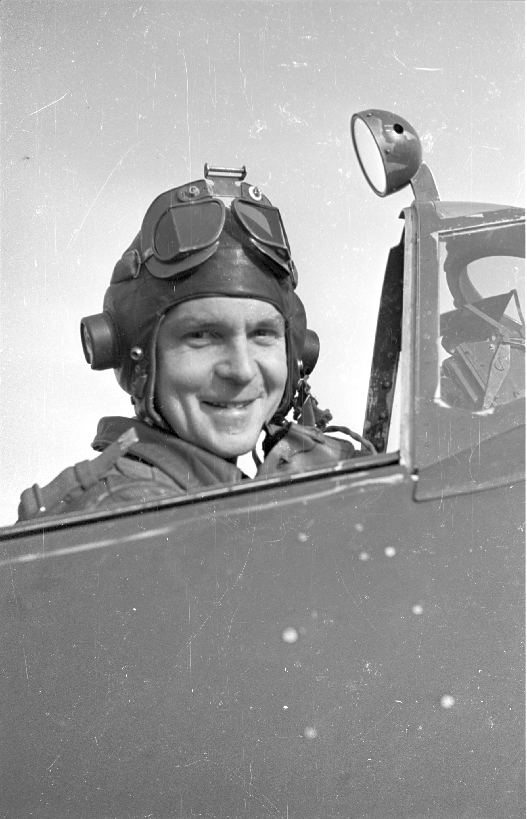 Bildet er hentet fra Arkivverket. Norske flyvere på kontinentet Arkivinstitusjon : Riksarkivet Arkivnavn : NTBs krigsarkiv Sted : UKJENT LAND, 00 Ukjent, 00 Ukjent, Emneord: Andre verdenskrig Avbildet